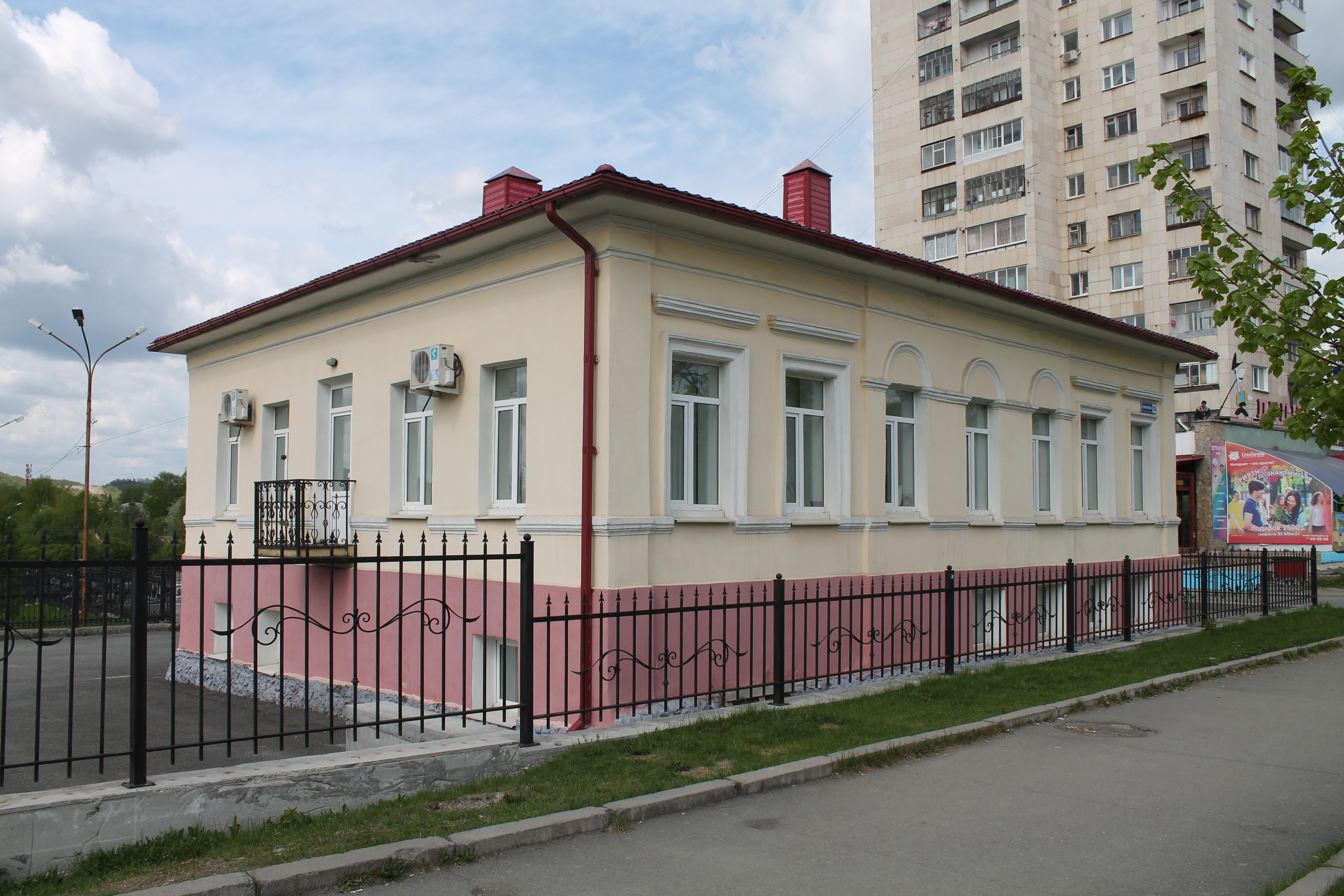 Нижний Тагил, улица Первомайская, 15